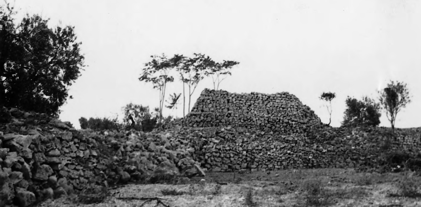 Torrione di Azetium